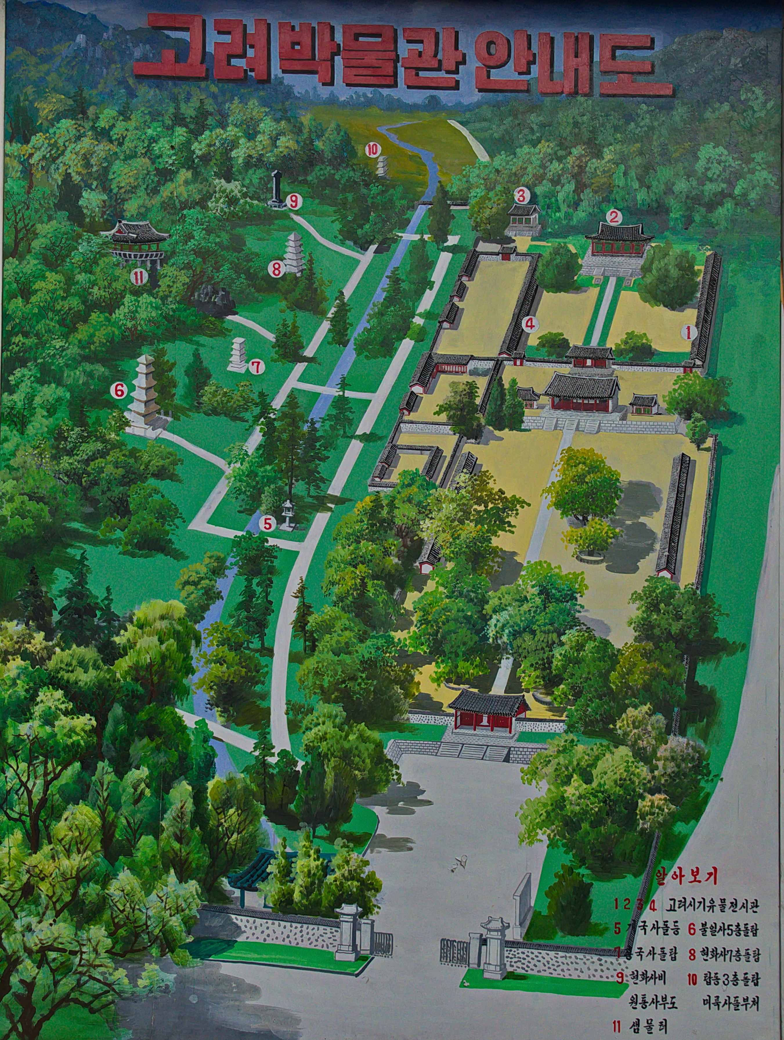 Nordkorea 2015 - Käsong - Koryo Museum